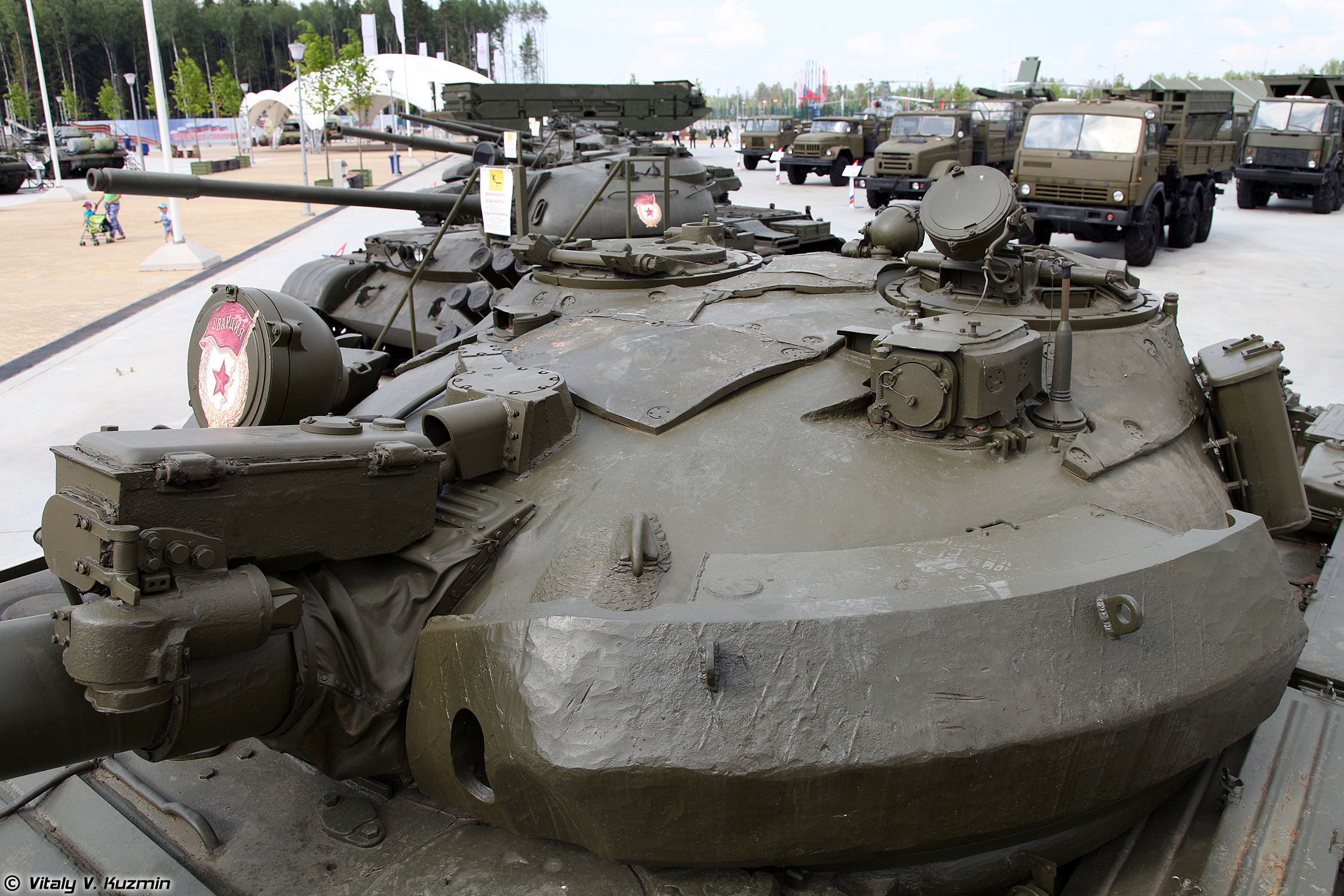 T-62M